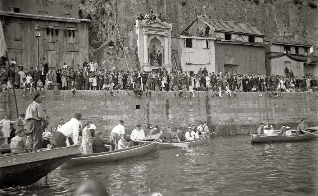 Título original: Ambiente en un día de regatas en San Sebastián (1/2) Localización: San Sebastián (Guipúzcoa)